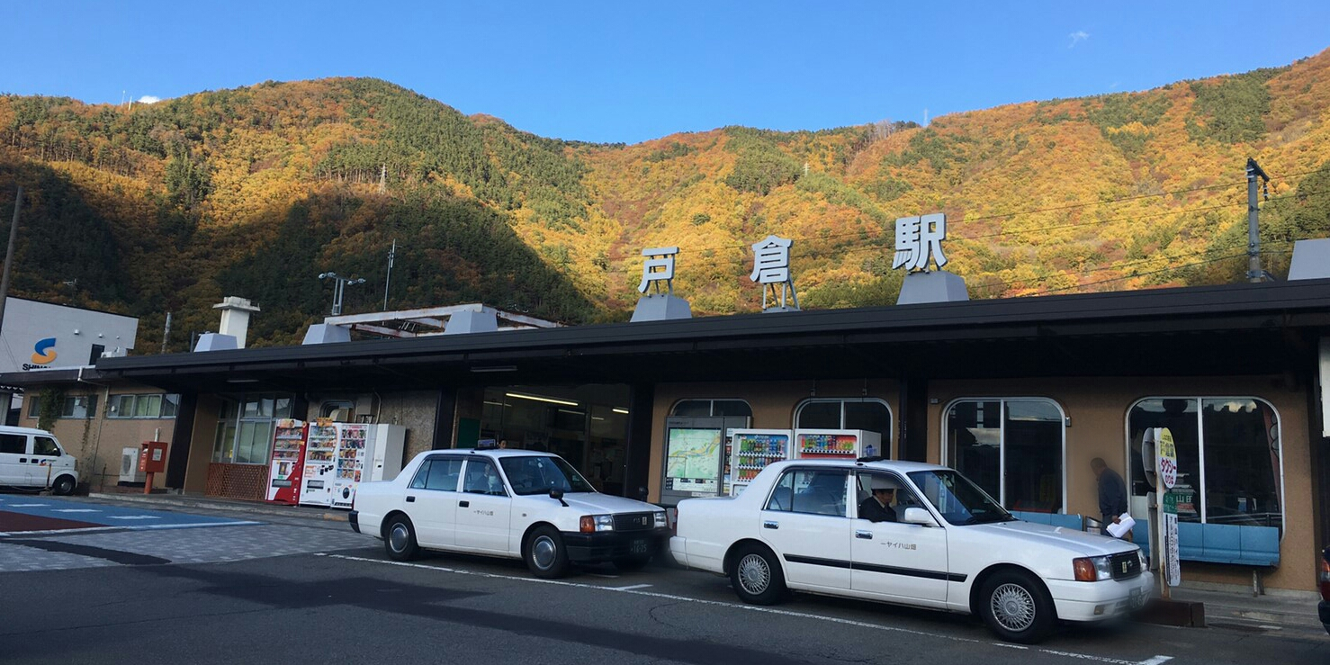 戸倉駅入口